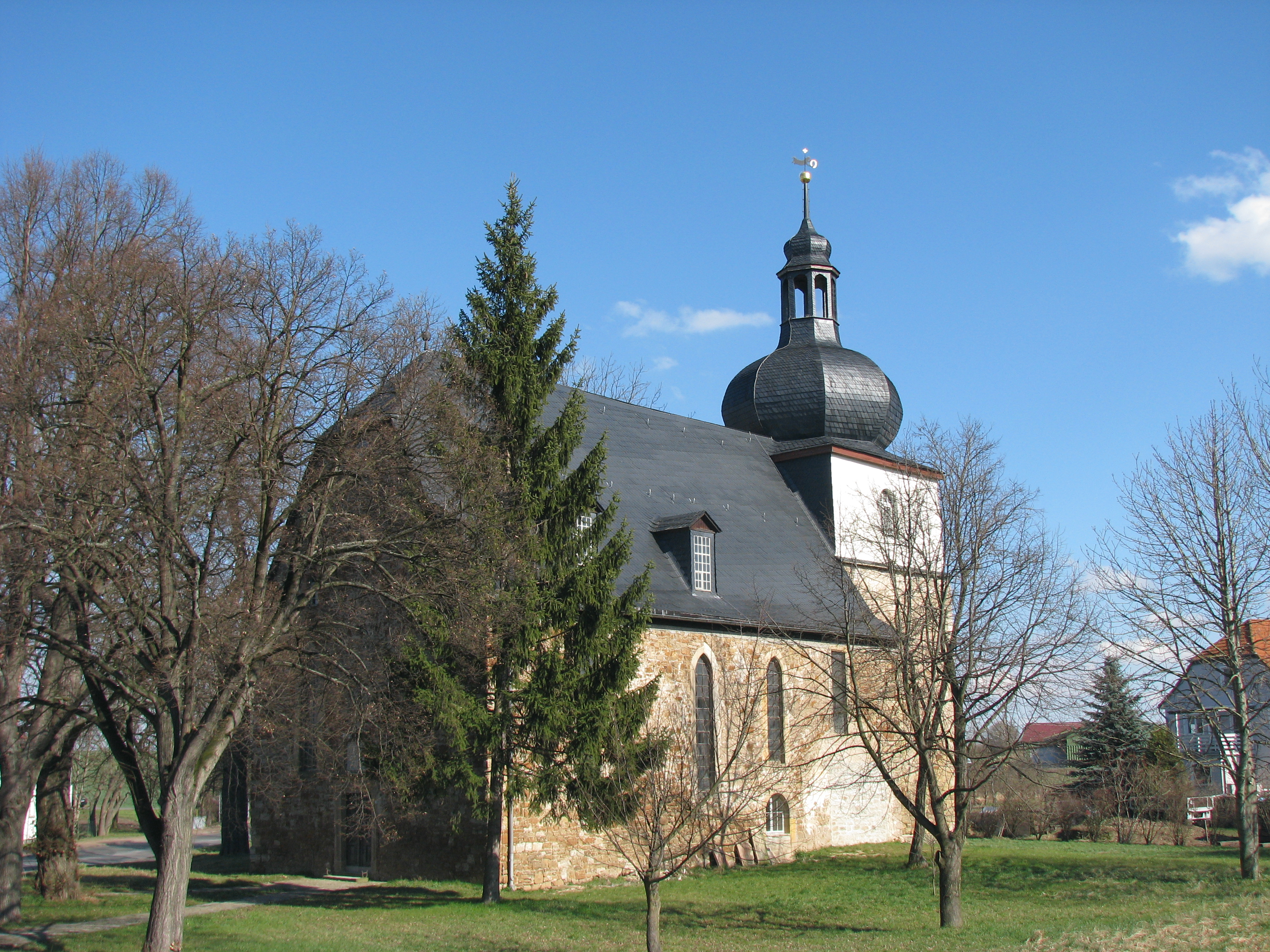 Blick auf die Guthmannshausener Kirche